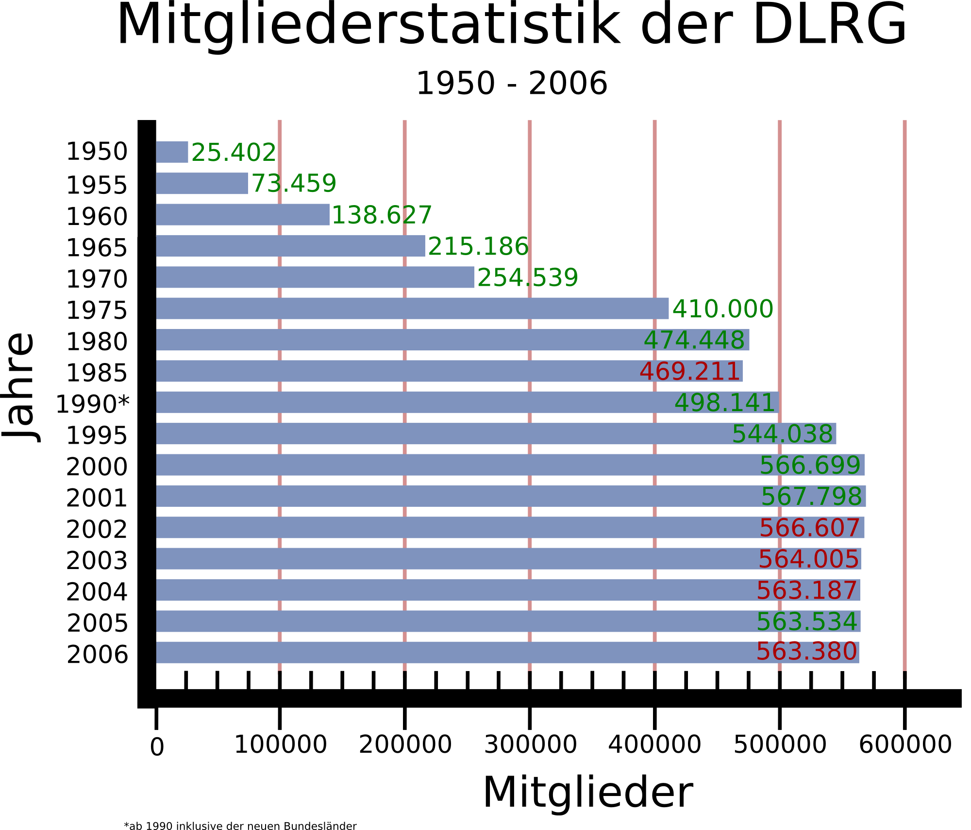 Mitgliederstatistik der DLRG von 1950 - 2005